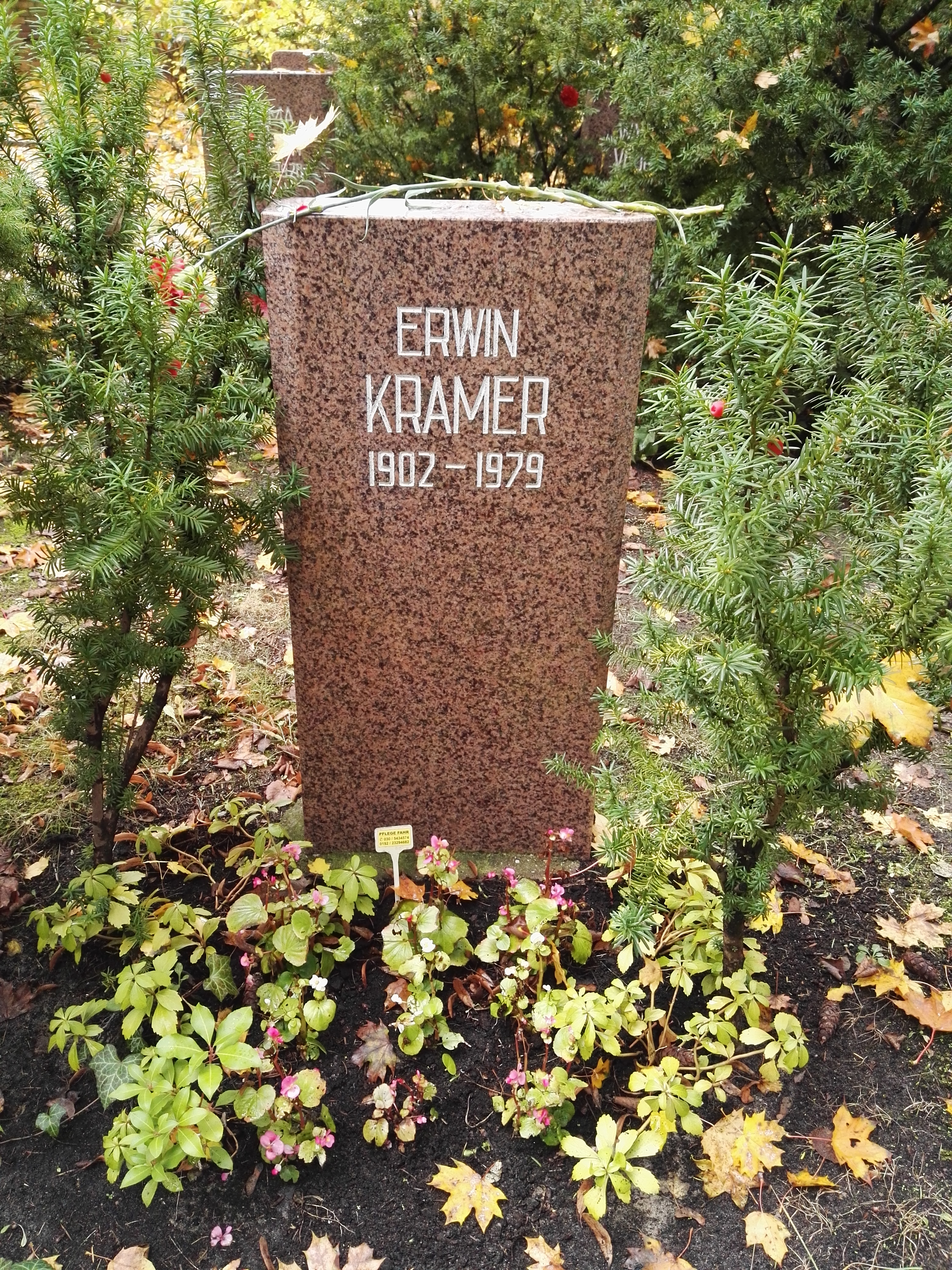 Grab von Erwin Kramer auf dem Sozialistenfriedhof des Zentralfriedhofs Friedrichsfelde